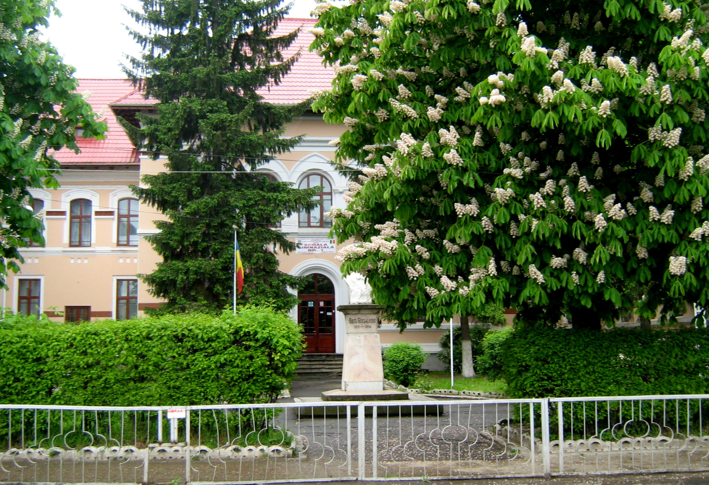 Liceul de Fete "Iorgu Radu", azi Școala cu Clasele I-VIII, Nr. 1 "Iorgu Radu